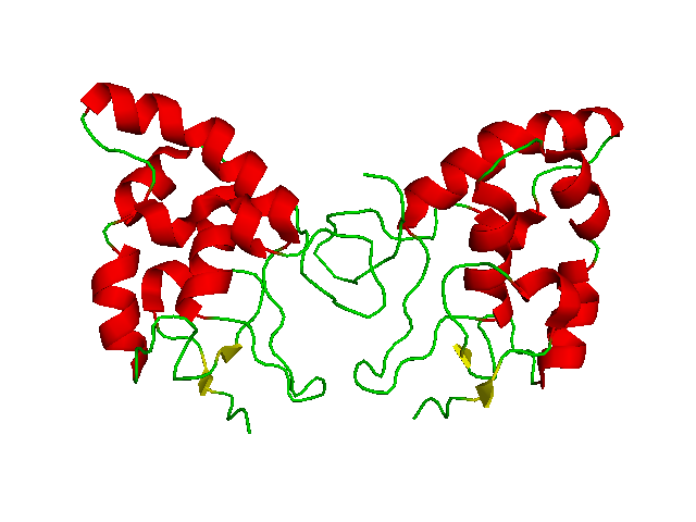 Frizzled